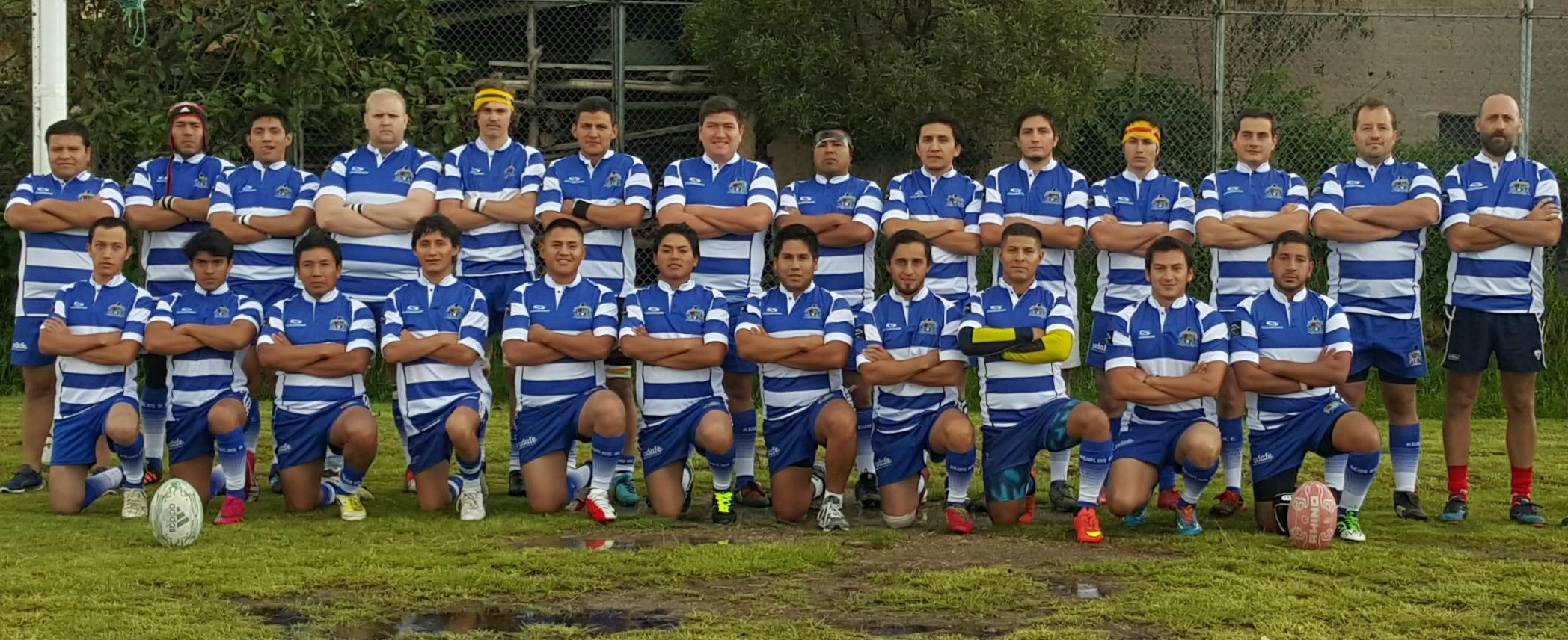 Plantilla Aguilas Rugby Club 2017